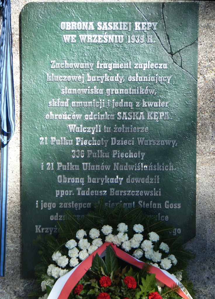 Miejsce upamiętniające barykadę z okresu obrony Warszawy we wrześniu 1939 roku. Ulica Francuska, w pobliżu skrzyżowania z ul. Zwycięzców.